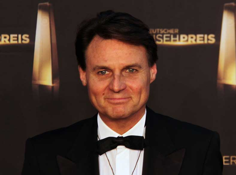 Wolfgang Bahro beim Deutschen Fernsehpreis 2012